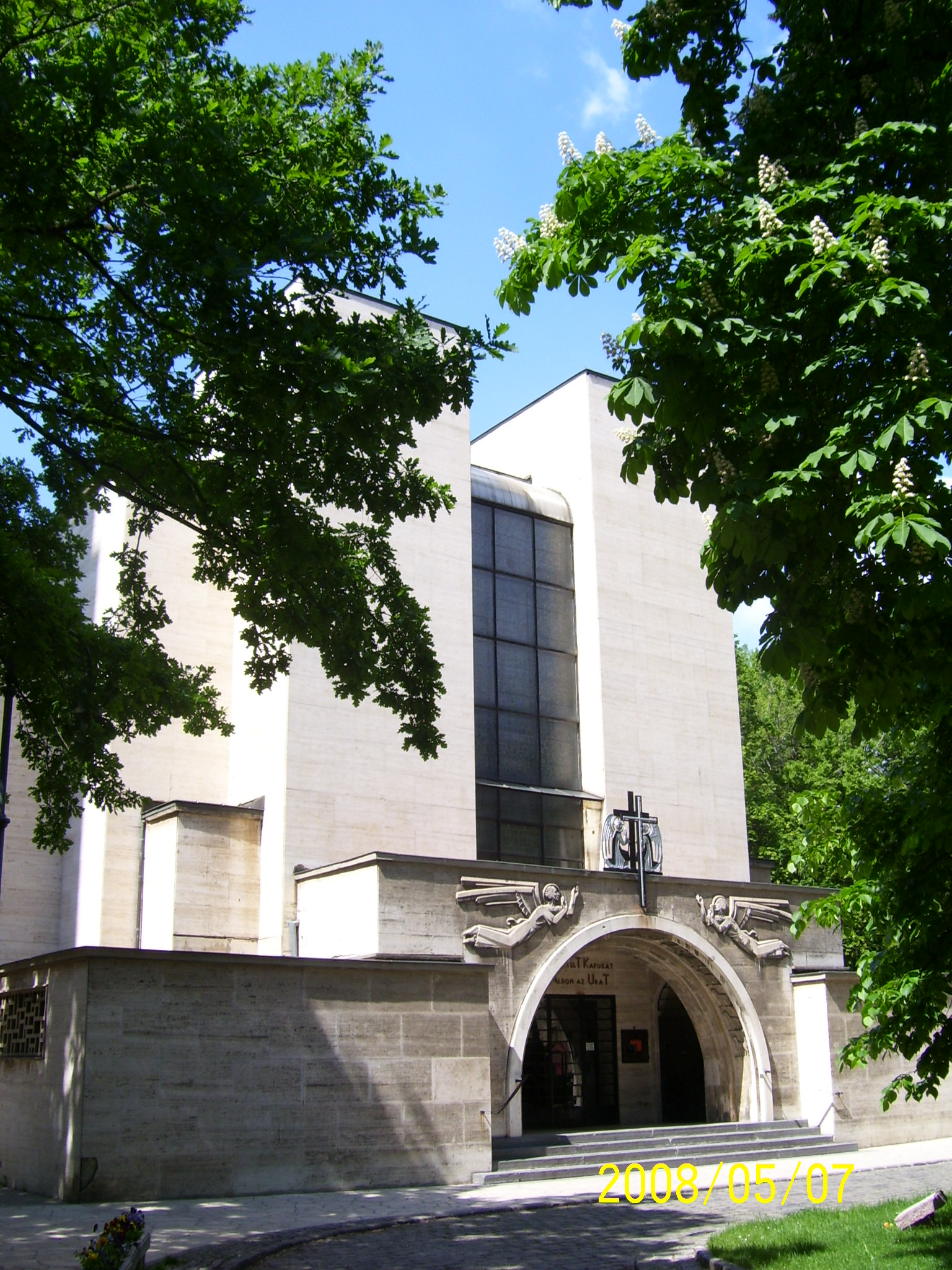 Városmajori templom 015.jpg